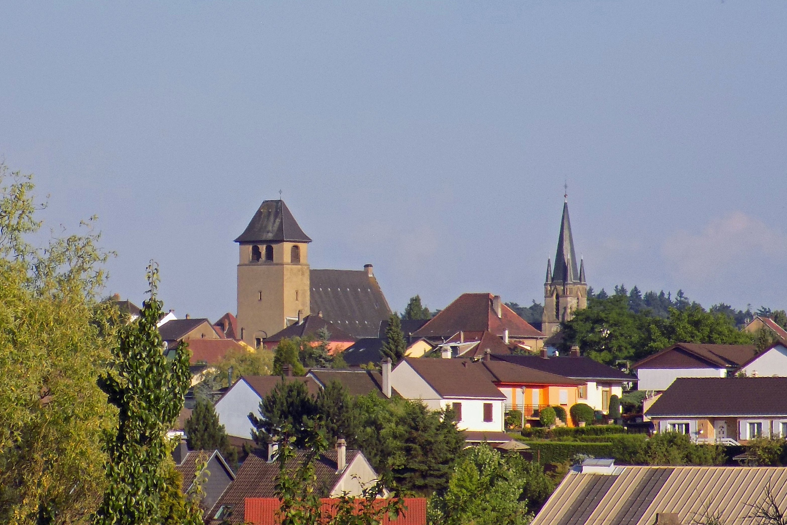 L'église luthérienne et l'église catholique Saint-Nicolas, L'Hôpital (Moselle)